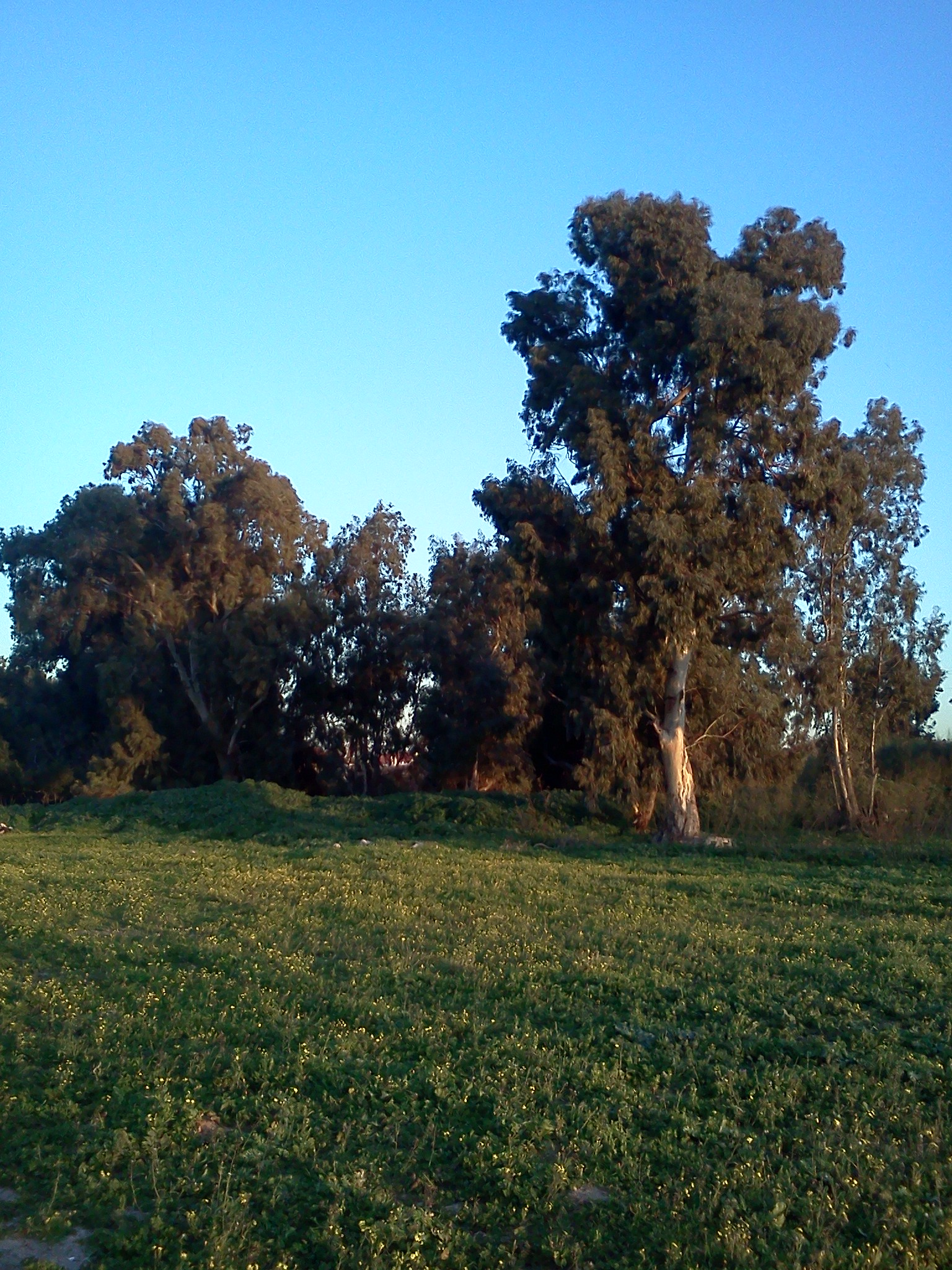 עצי אקליפטוס המציינים את מיקום הערוץ